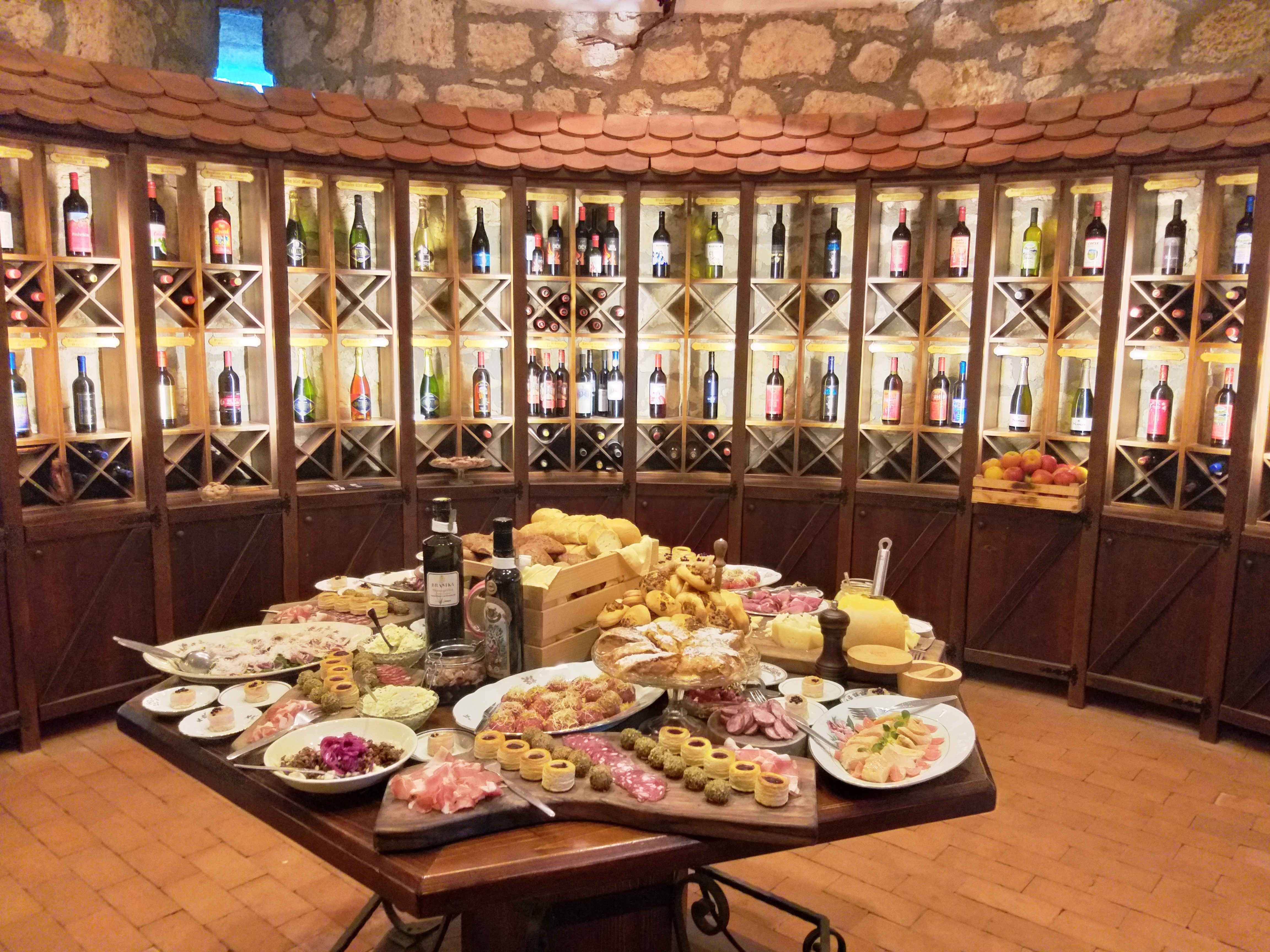 Grajska vinoteka s posavskimi vini